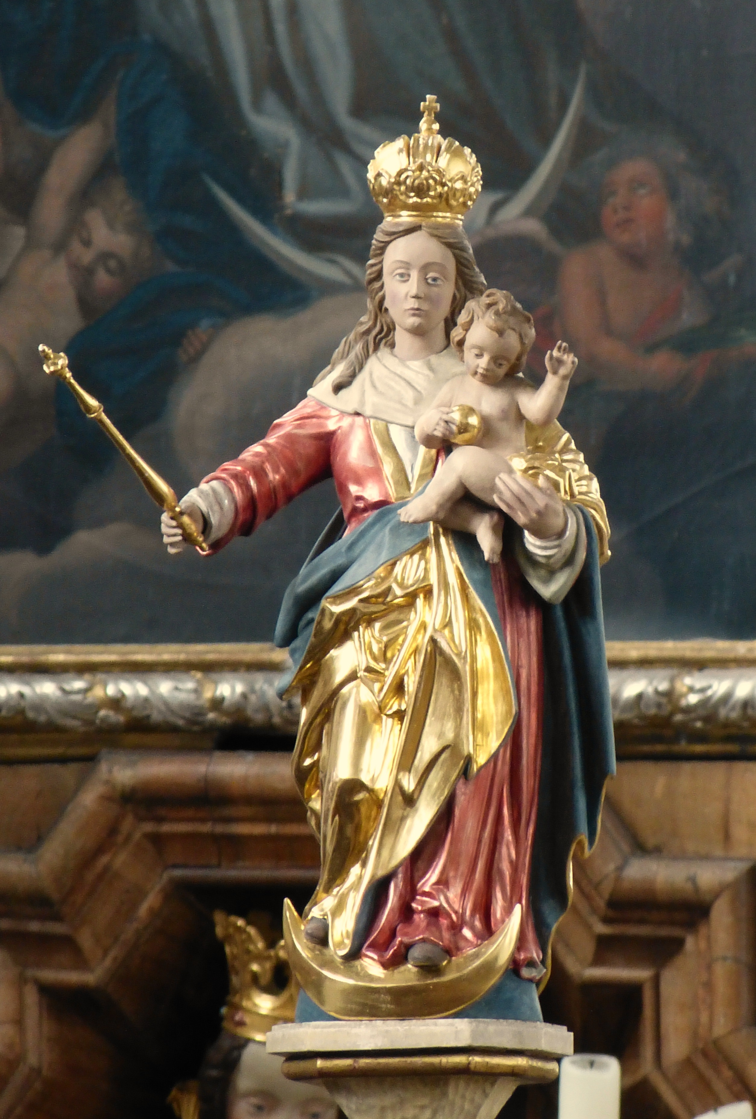 Batzenhofen, Pfarrkirche St. Martin, Madonna.